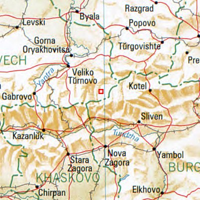 Elena - Lage des Ortes in Bulgarien